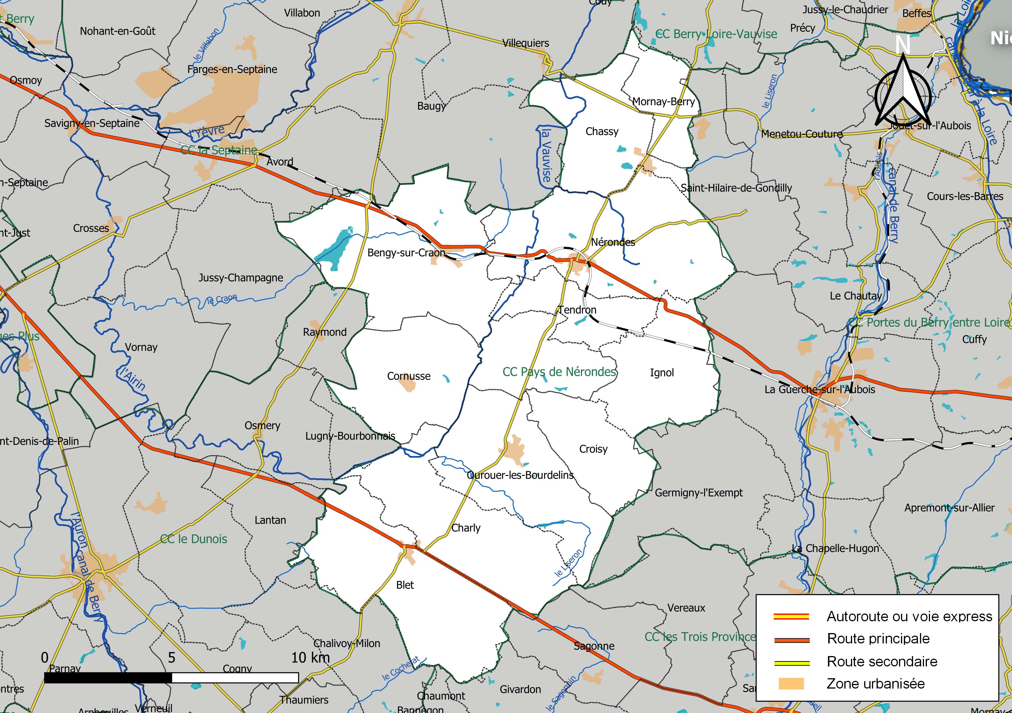 Carte géographique de la communauté de communes Pays de Nérondes, département du Cher, France. Composition au 1er janvier 2019.